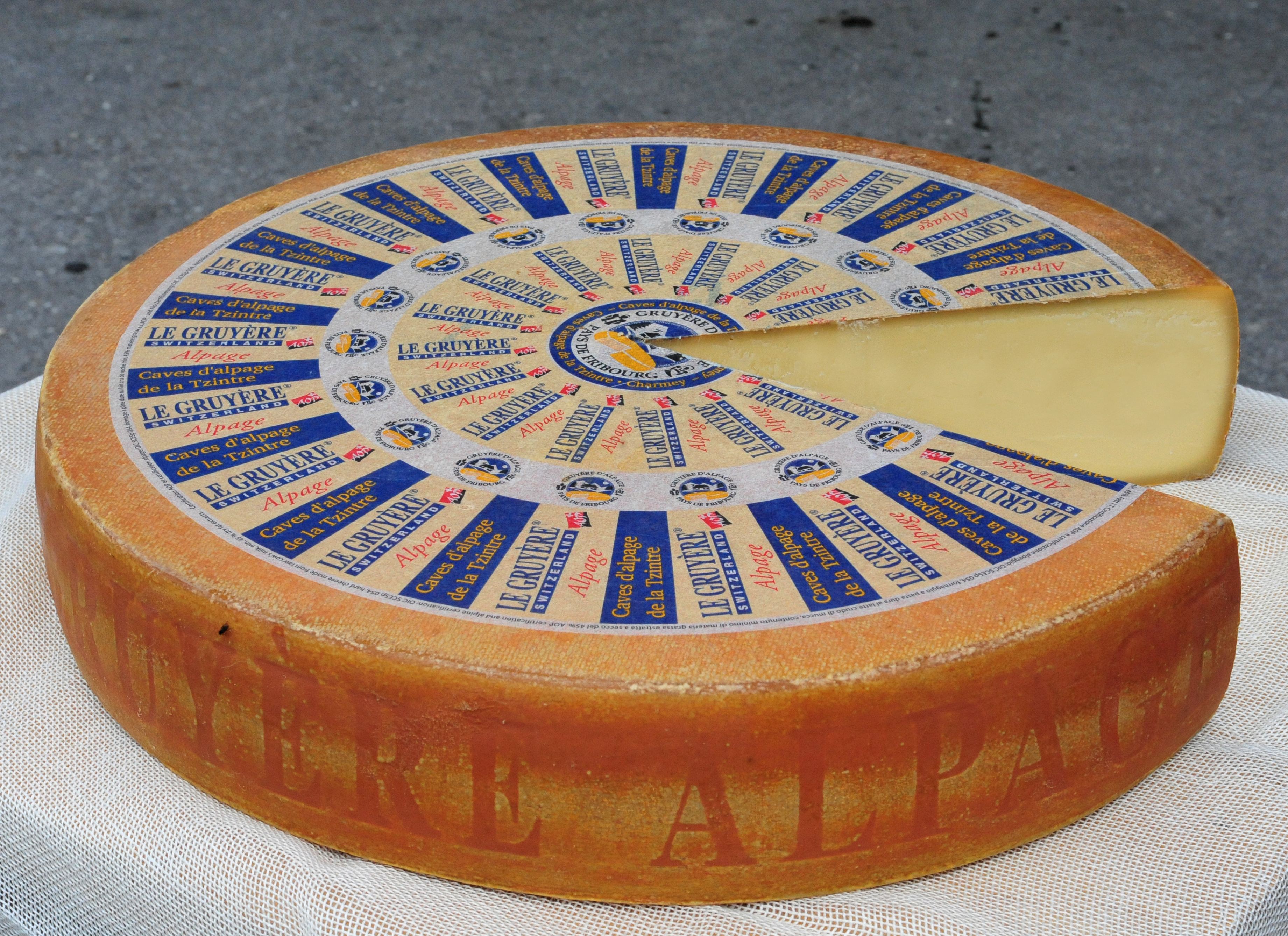 Gruyère d'alpage N°6062 à La Tzintre (Val-de-Charmey, district de la Gruyère, Fribourg, Suisse